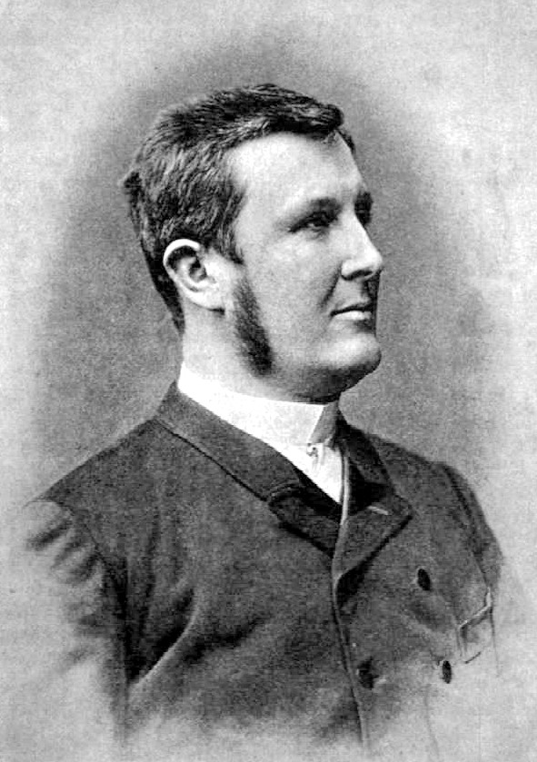 Wekerle Sándor (1848–1921) politikus, miniszter, miniszterelnök portréja. Ellinger Ede fényképfelvétele